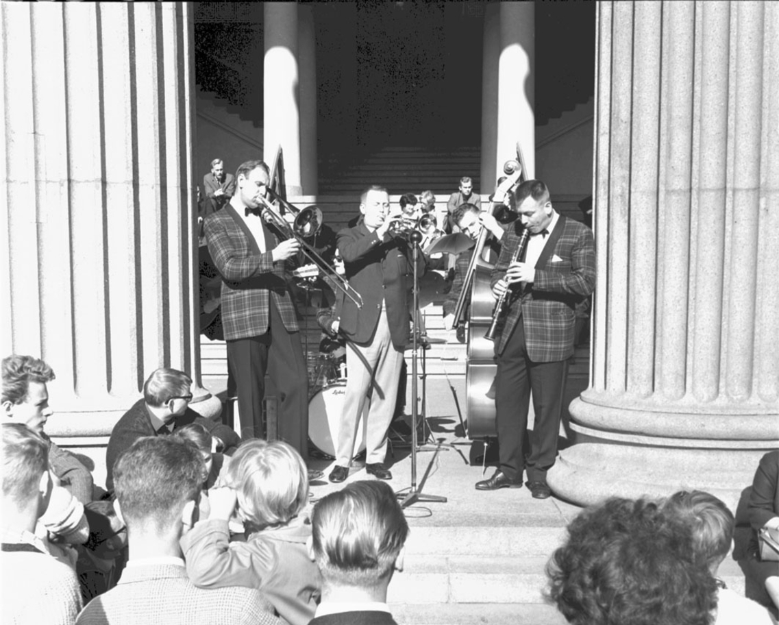 Big Chief Jazzband spiller på Universitetsplassen under Studenteruka i 1962.